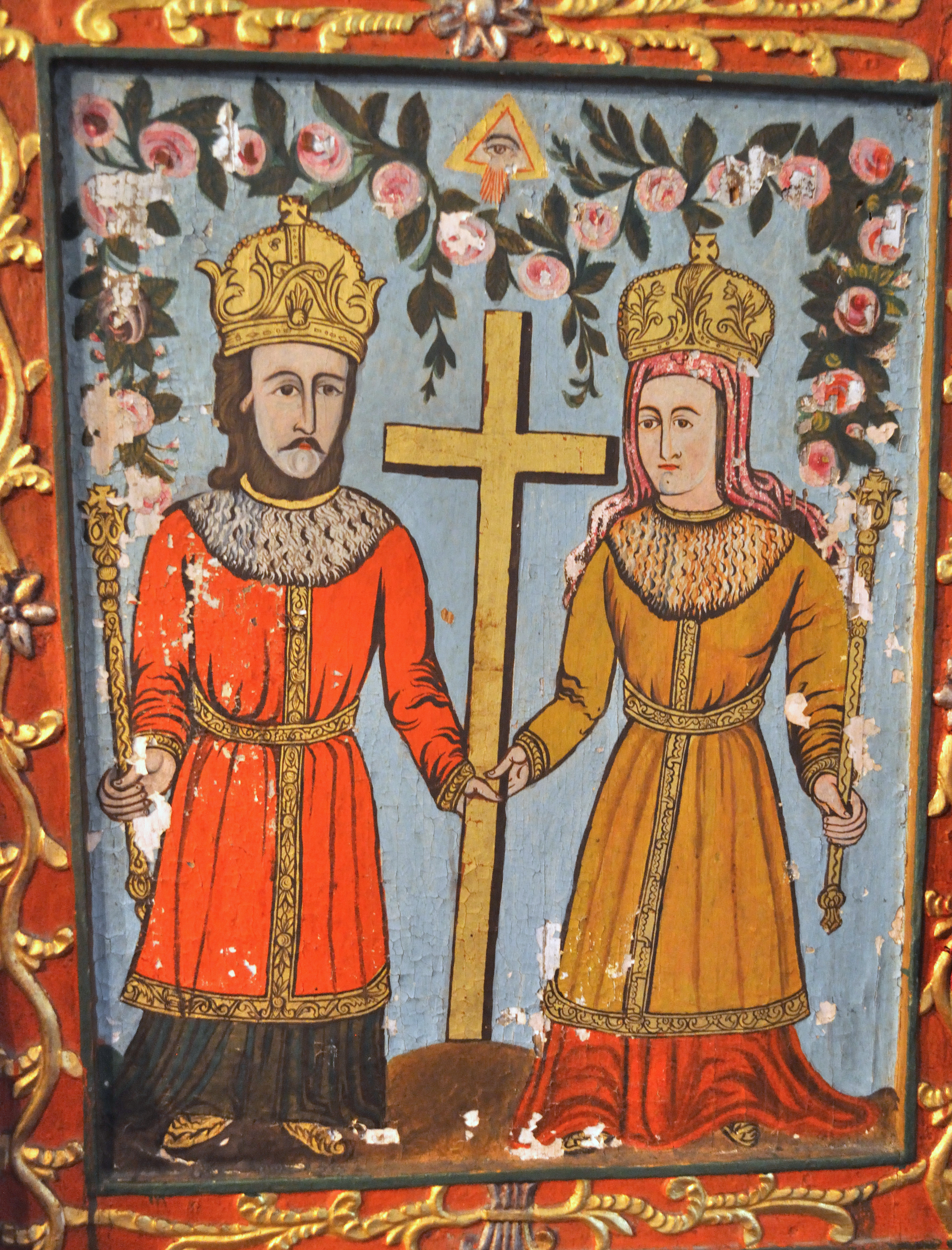 Biserica de lemn „Sfinții împărați Constantin și Elena” din Bârlești, județul Alba